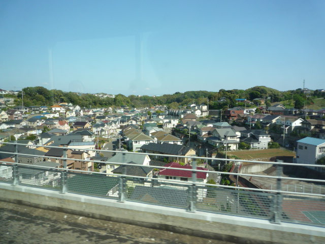 車窓からの風景